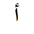 Der arabische Buchstabe Alif mit Hamza darüber.